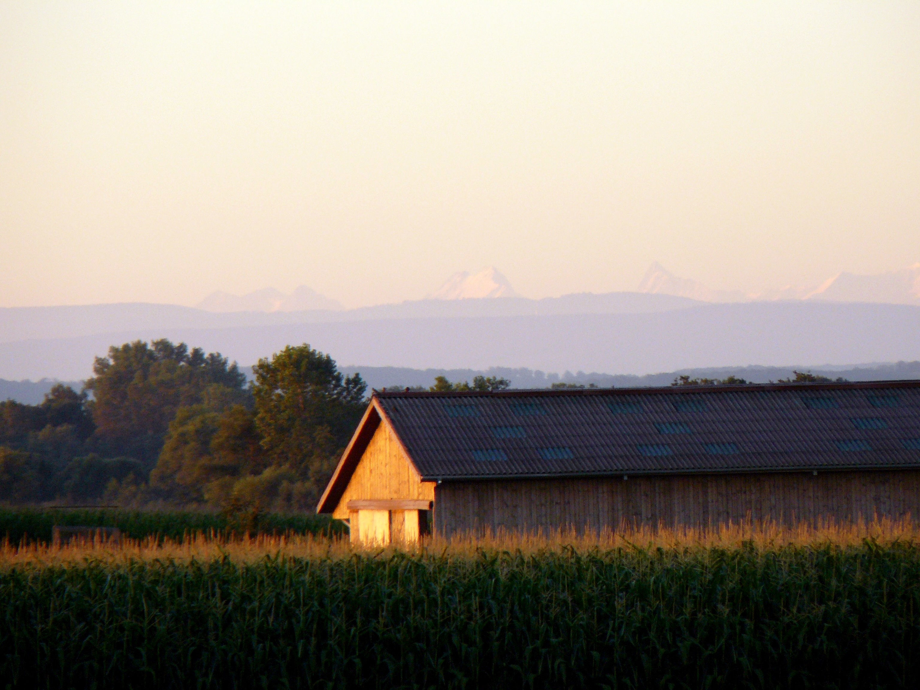 Les Alpes bernoises à l'horizon, au-delà du Jura, vues depuis les environs de Schweighouse-Thann (Haut-Rhin, France) à 150 km à vol d'oiseau.